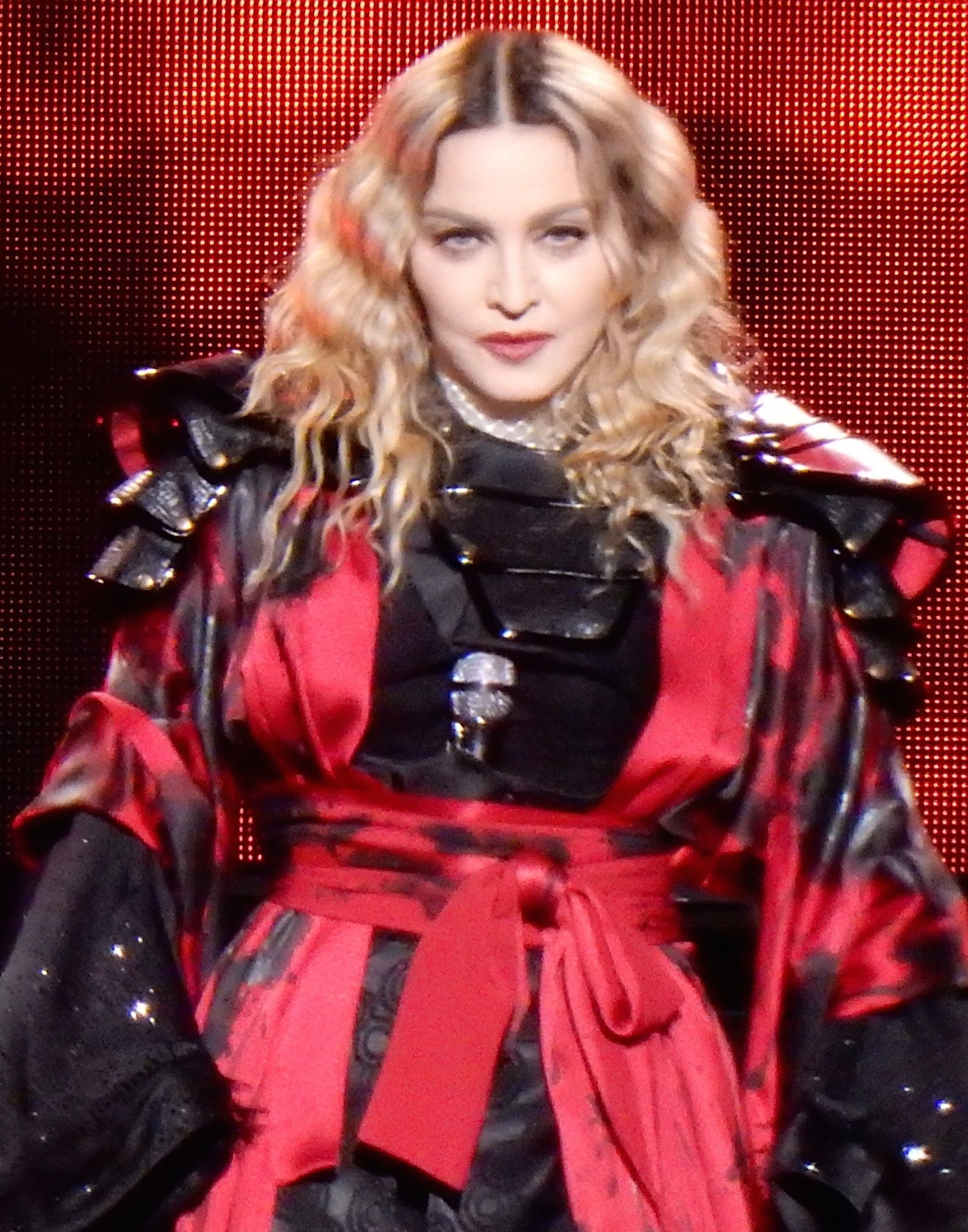 Madonna Rebel Heart Tour 2015 - Amsterdam 2